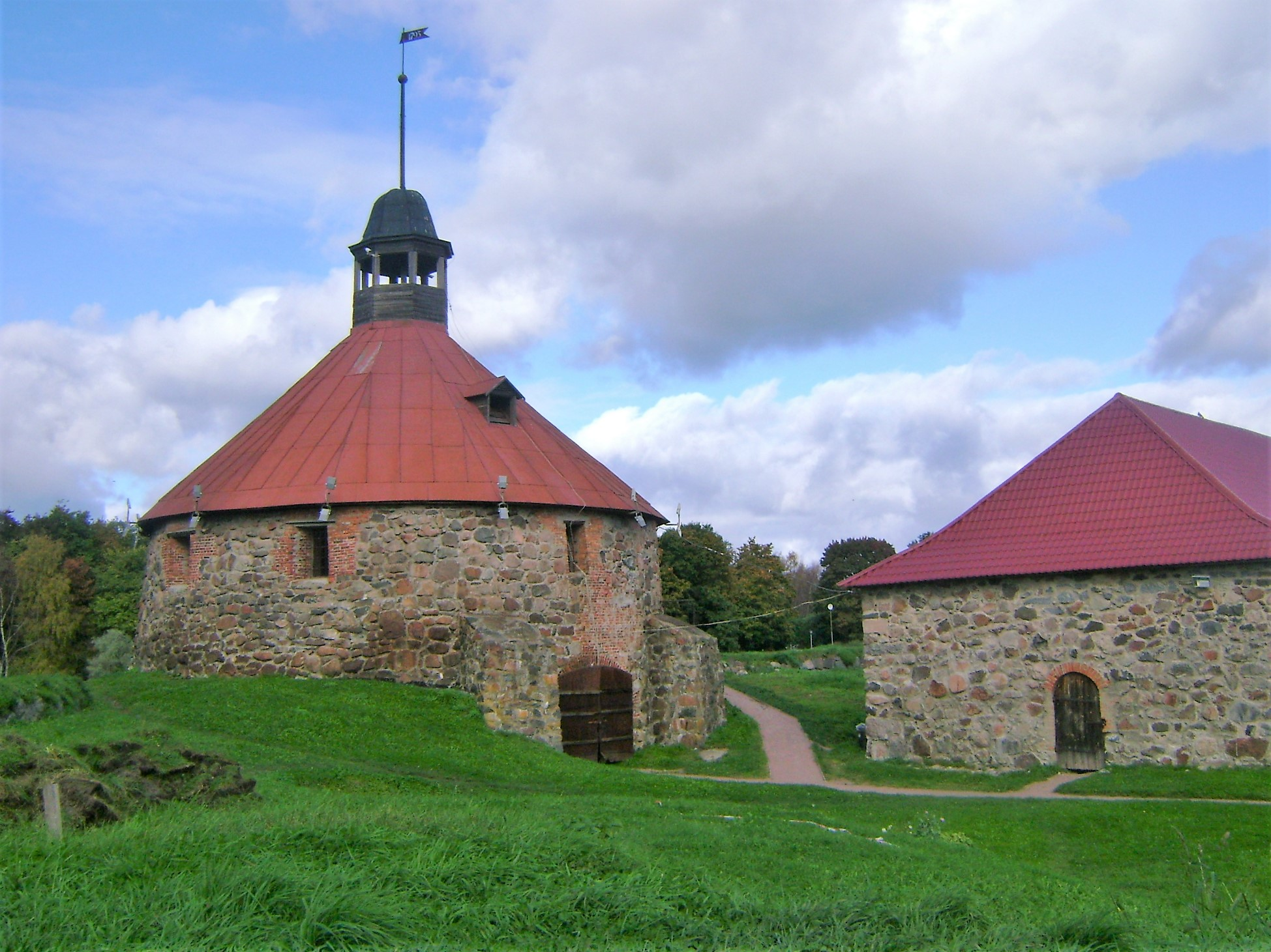 Korela Fort